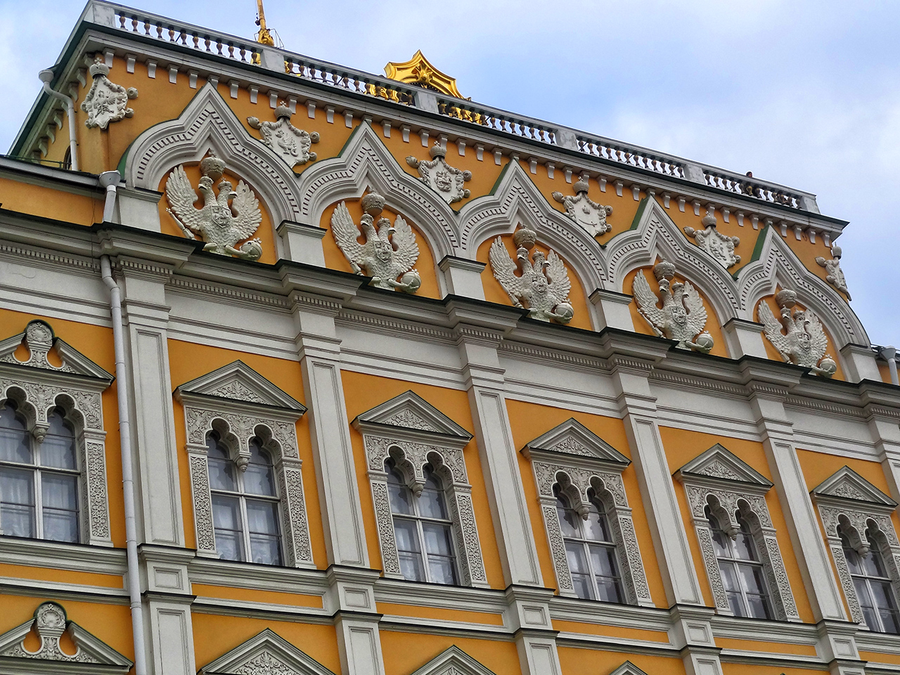 Убранство Большого Кремлевского дворца